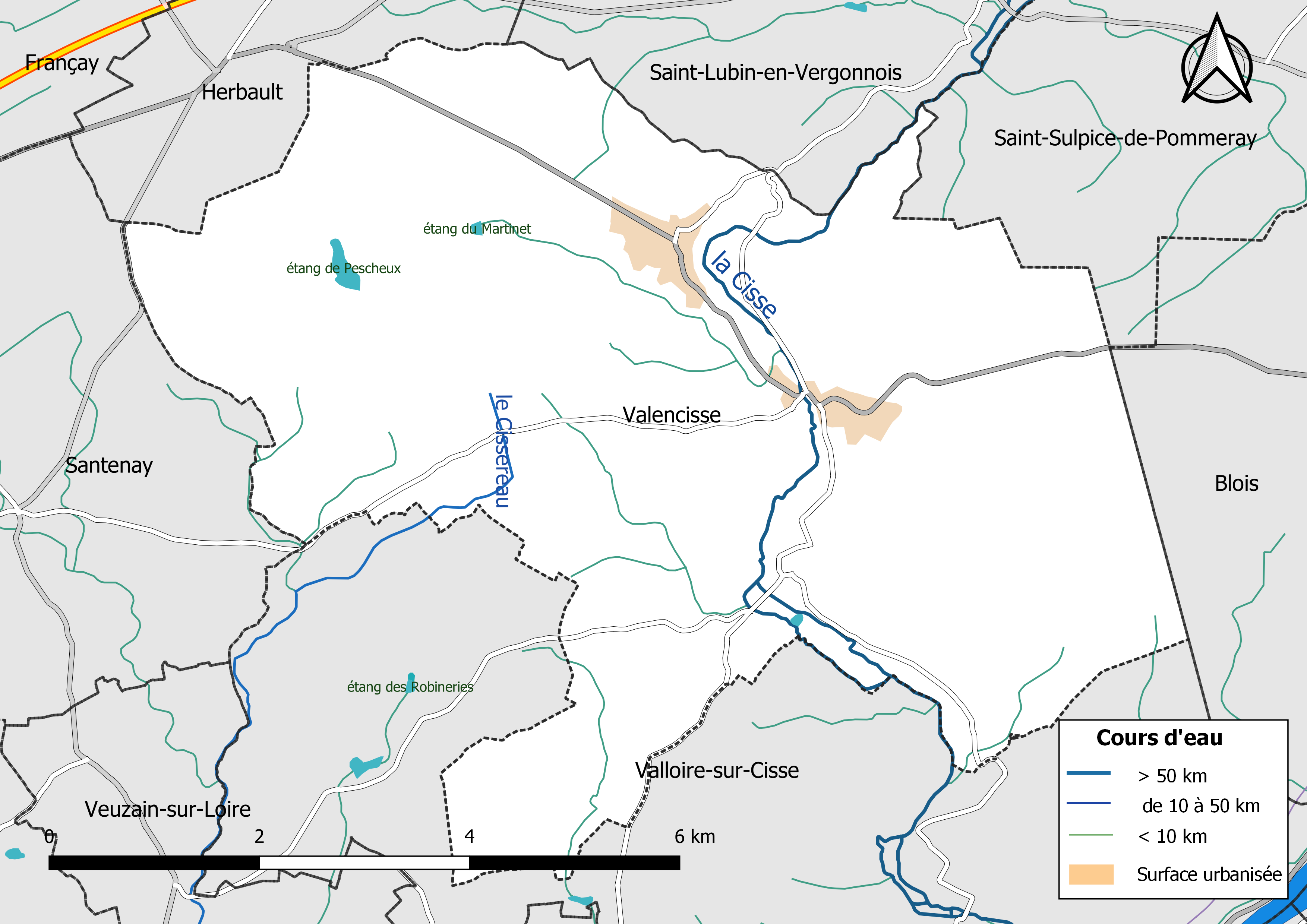 Carte du réseau hydrographique de la commune de Valencisse (Loir-et-Cher, France).